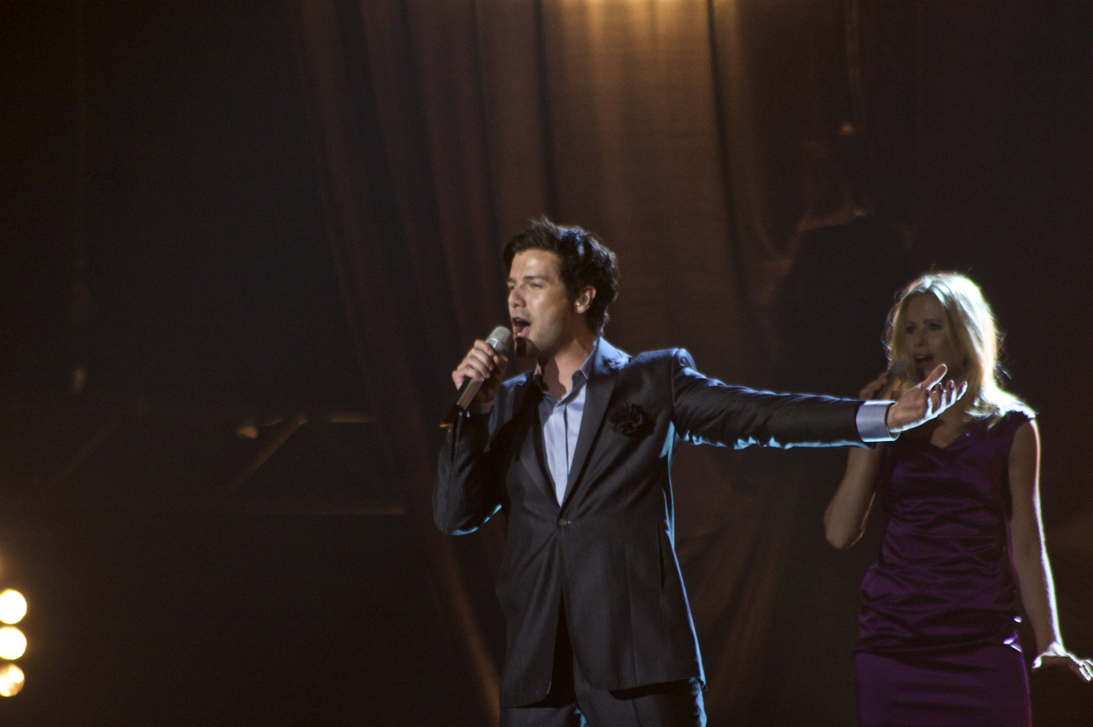 Foto: Vincent Hasselgård, Aktiv I Oslo.no Les artikkel på